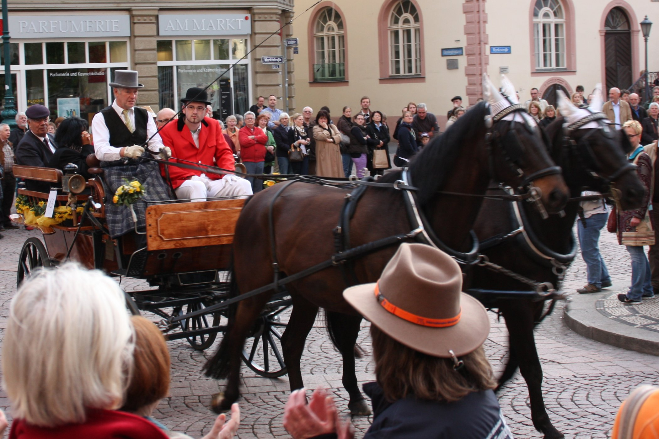 Kutsche Nr. 13 des Korso zur Eröffnung des Internationalen Pfingstturnier Wiesbaden 2013 in Hessen, Deutschland. Eine Wagonette, gezogen von zwei Polnischen Warmblut (Wielkopolski) im Kumtgeschirr.